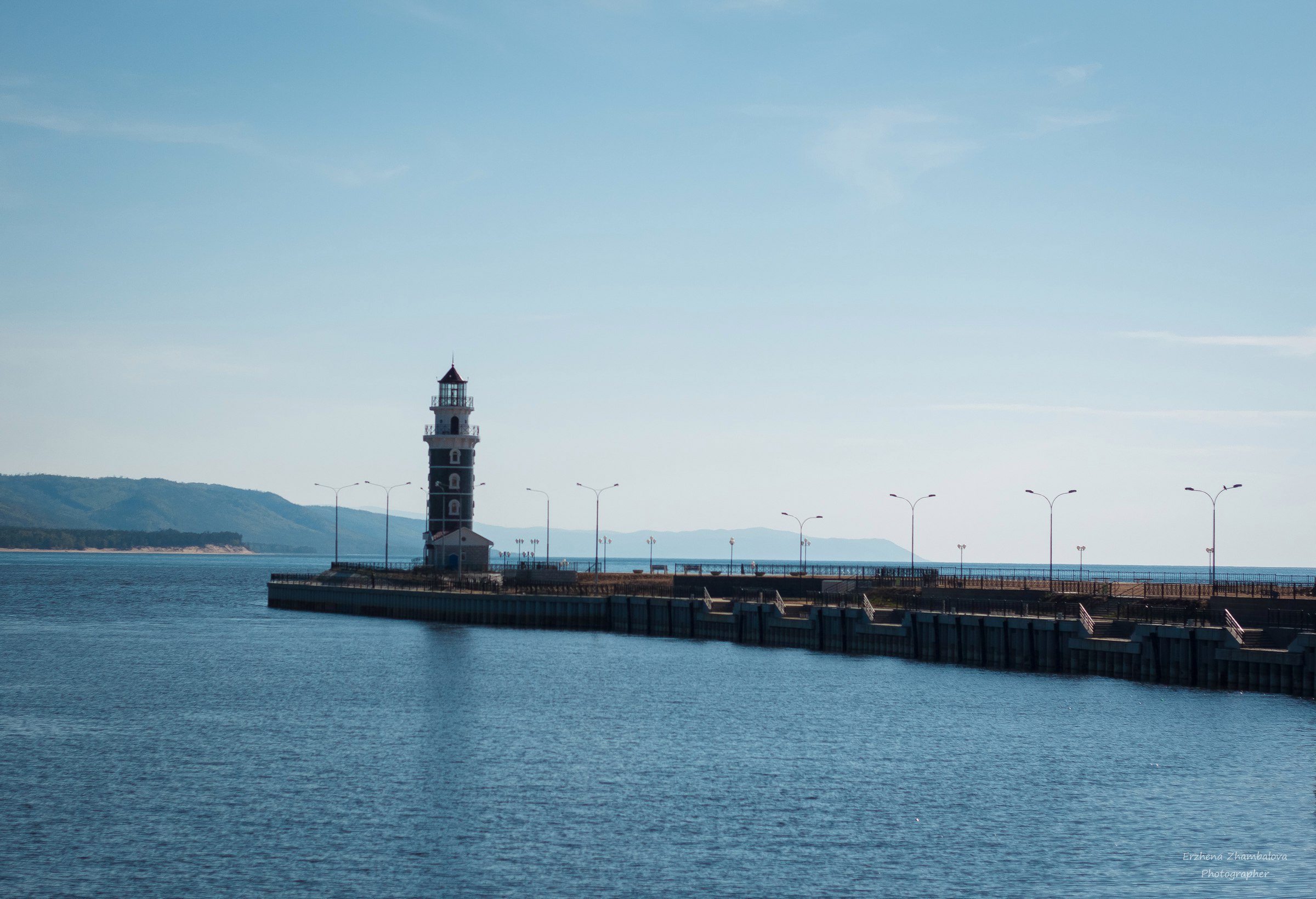 Tourist zone "Baikal harbor"-2